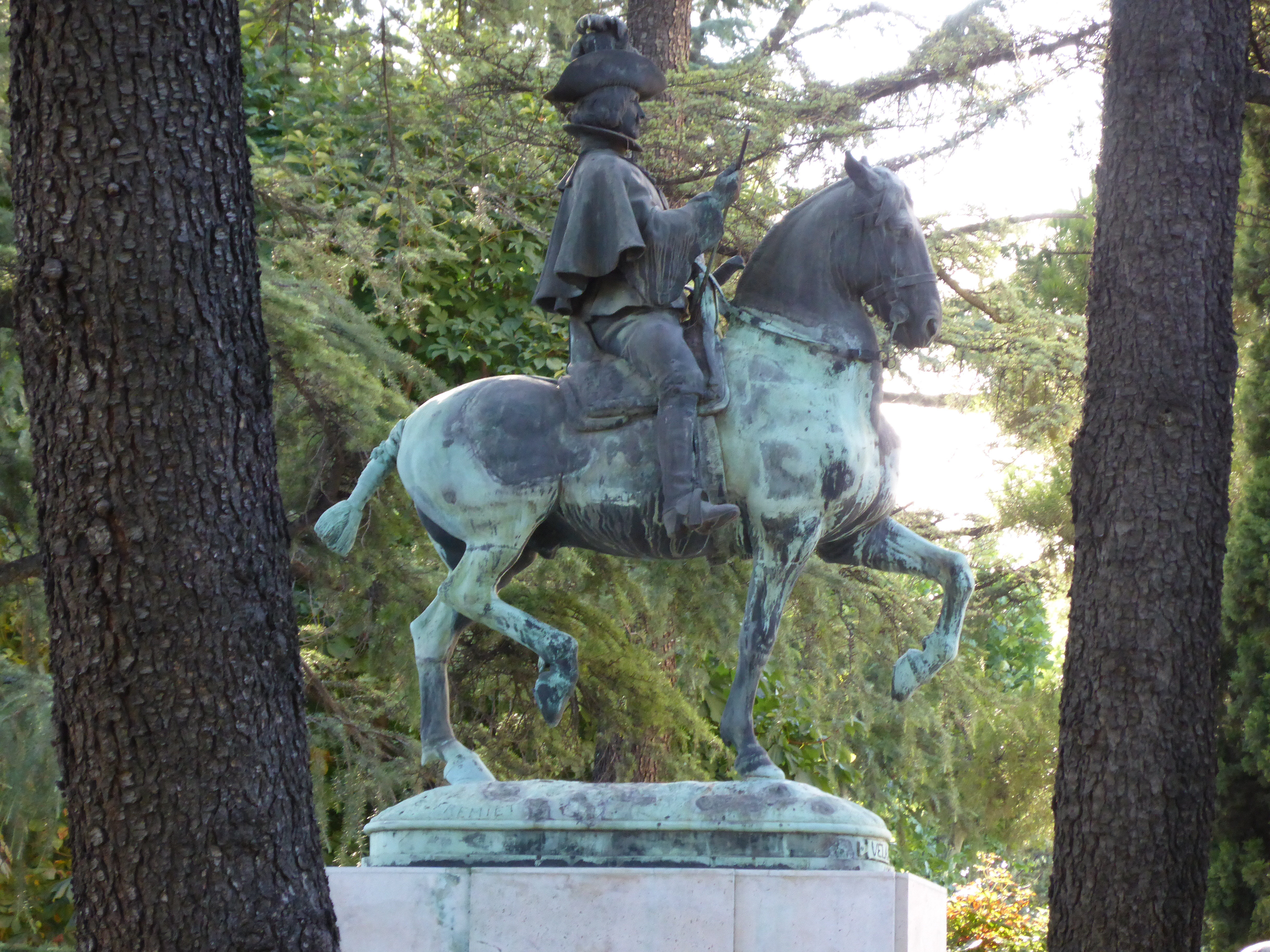 La "Casa de Velázquez" es una institución cultural francesa, presente en la Ciudad Universitaria de Madrid. Durante la Guerra Civil española, entre 1936 y 1939, resultó muy dañada. Luego tuvo que ser reconstruida, al igual que la escultura ecuestre del pintor barroco español Diego Velázquez, realizada en bronce, obra de Emmanuel Frémiet. La escultura original anteriormente había estado en París.